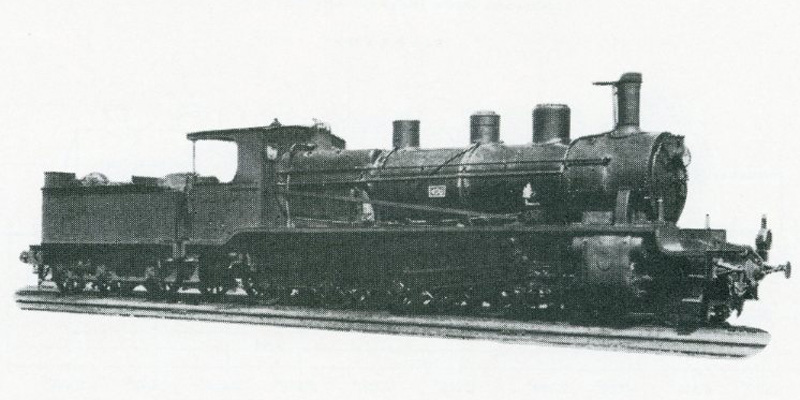 Locomotora de vapor perteneciente Serie 401 a 450 de la Compañía de los Ferrocarriles Andaluces.